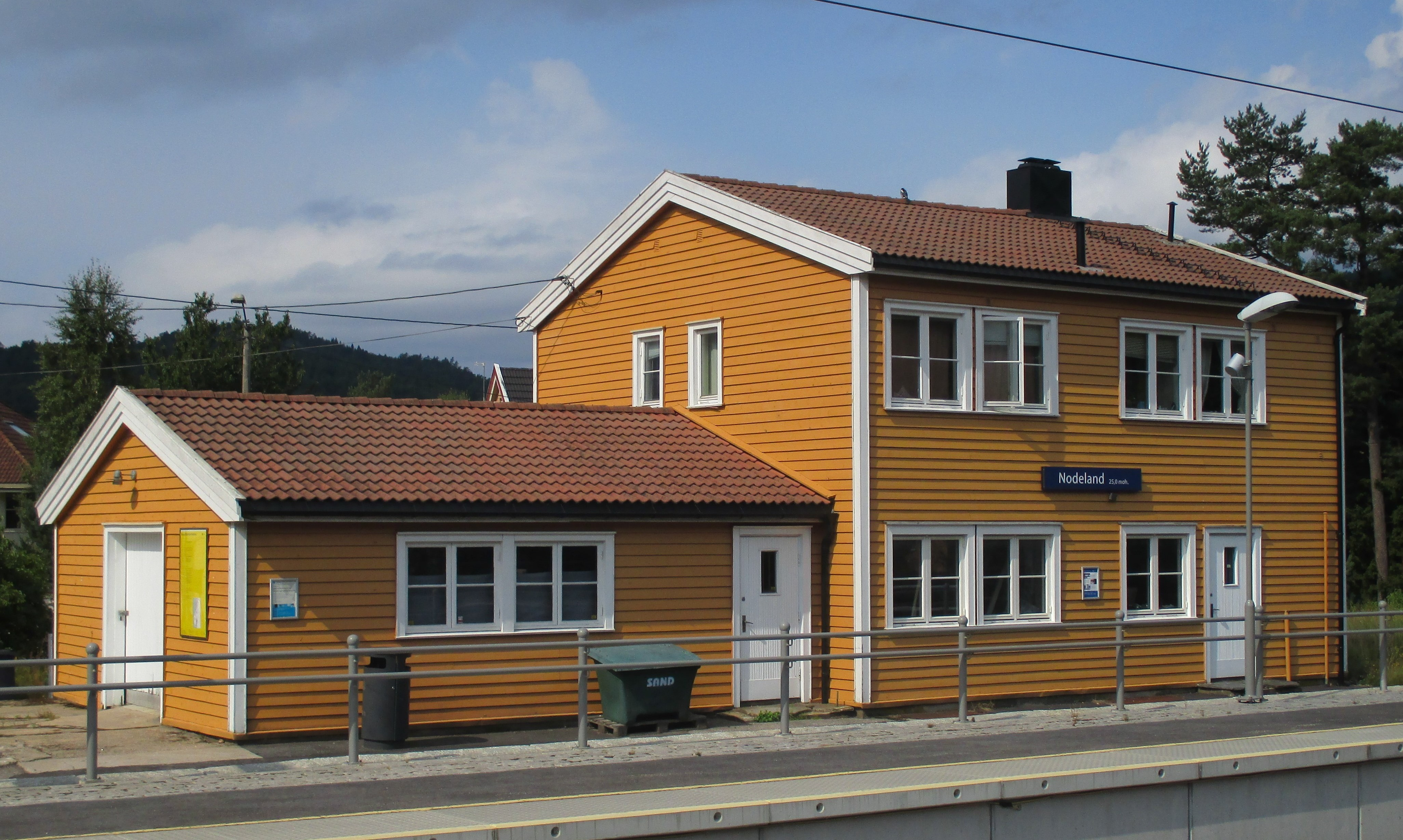 Nodeland stasjon